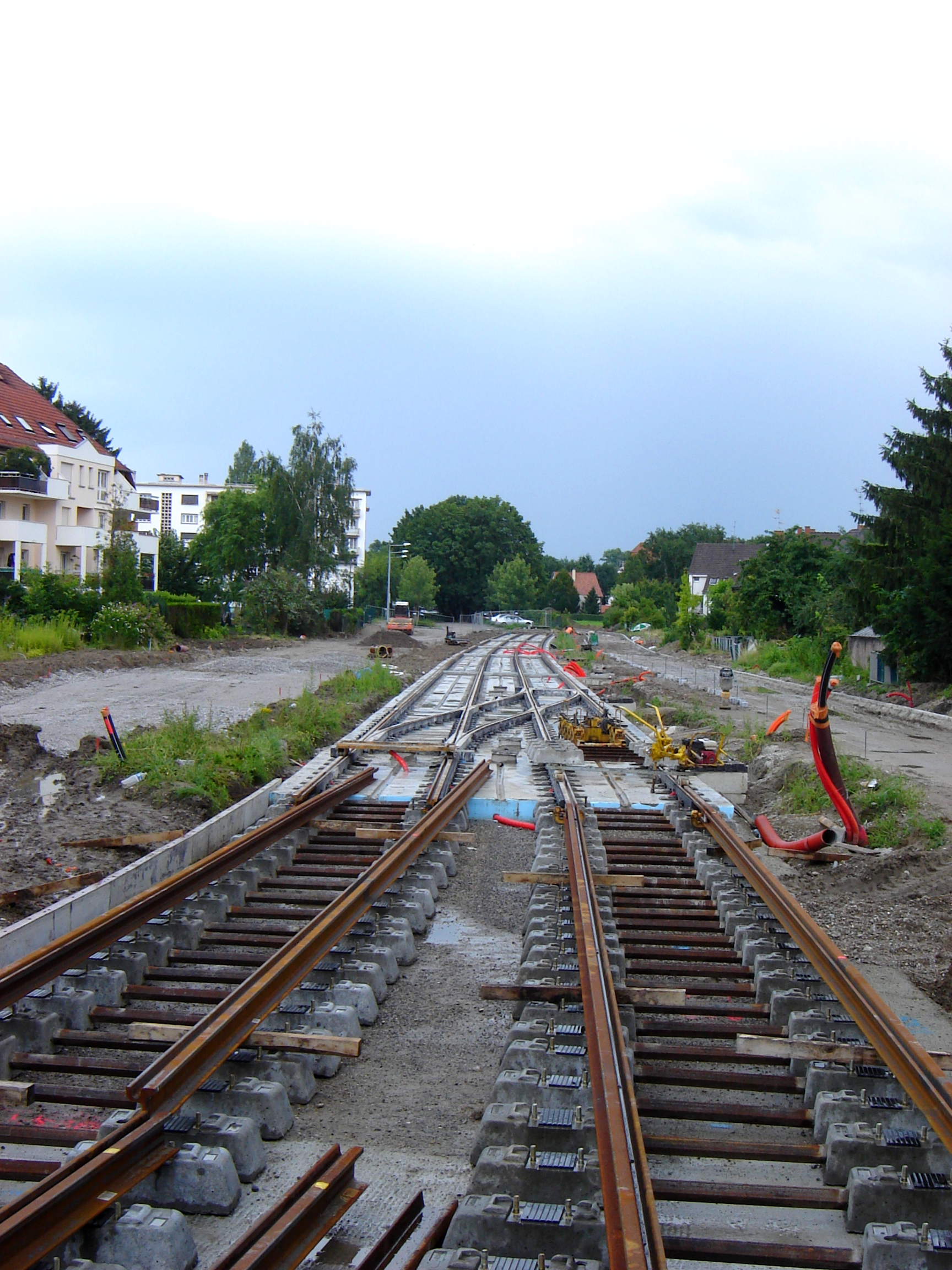 Chantier des extensions tram 2007 - 2008, en juin 2007